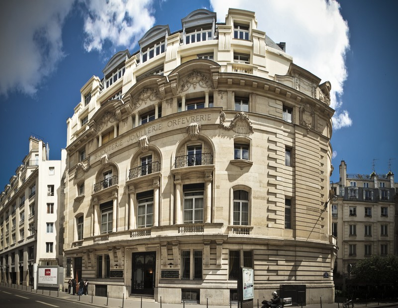 L'immeuble de l'Union Française BJOP - 2011